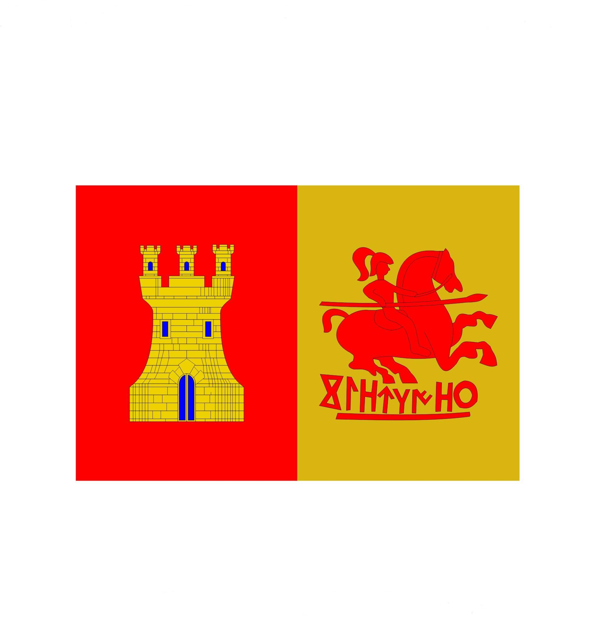 escudo de peñalba de castro